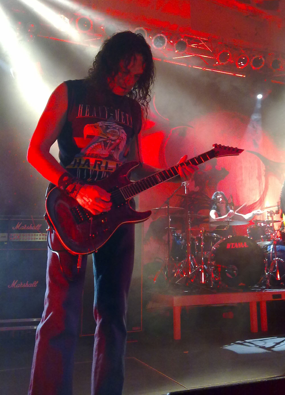 De Gittarist Sergei Popow an de Batteur Maxim Udalow vun der Grupp Aria, op engem Däitschland-Concert 2012.